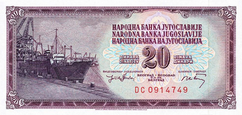 20 Yugoslav dinar (1974) - obverse